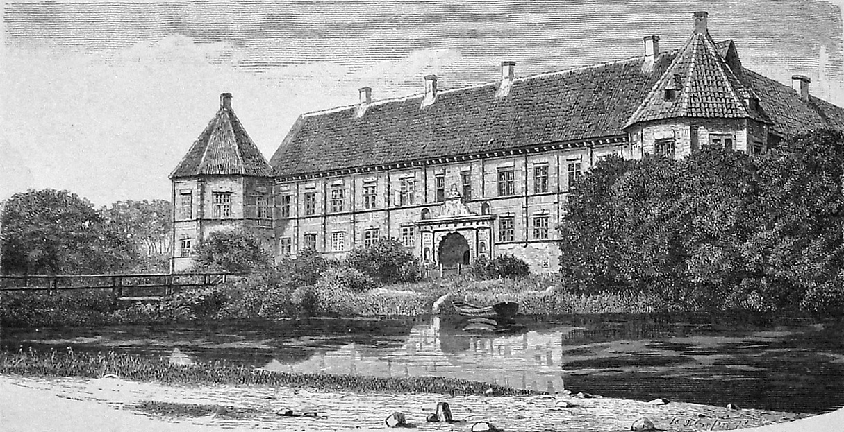 Voergaard Slot